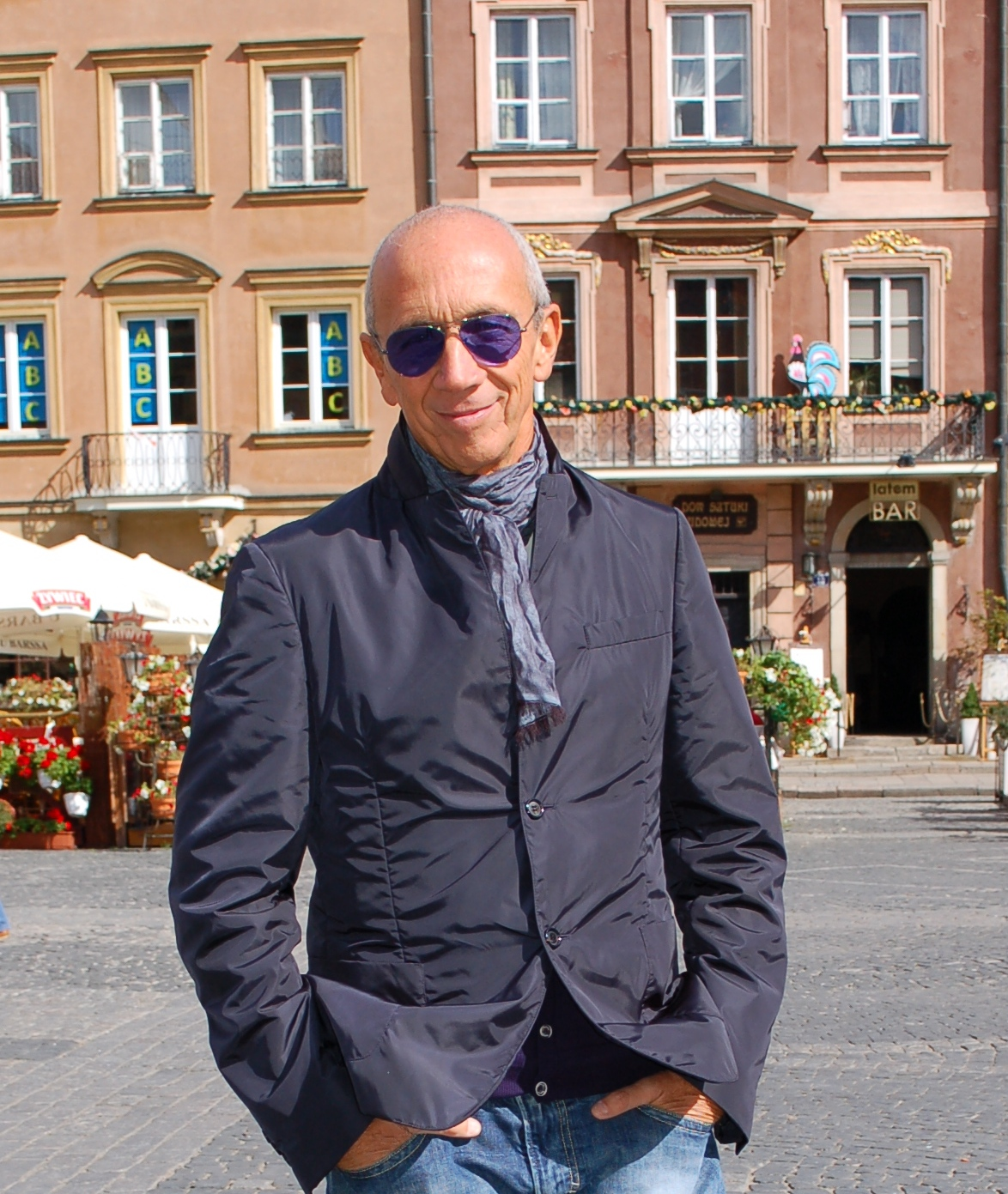 Roberto Zanetti at Old Town Market Square in Warsaw